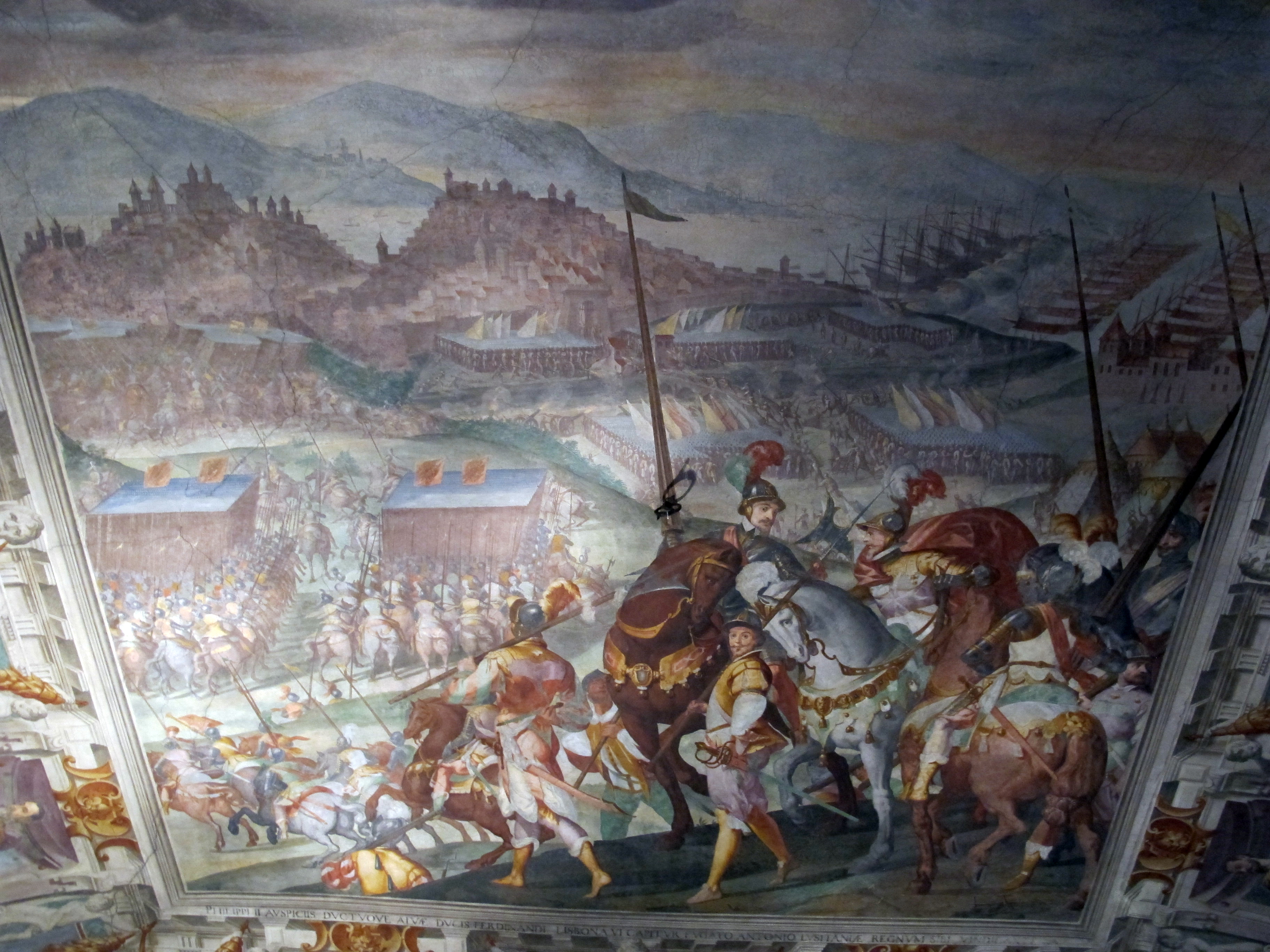 Palazzo Spinola in Pellicceria (Genova)